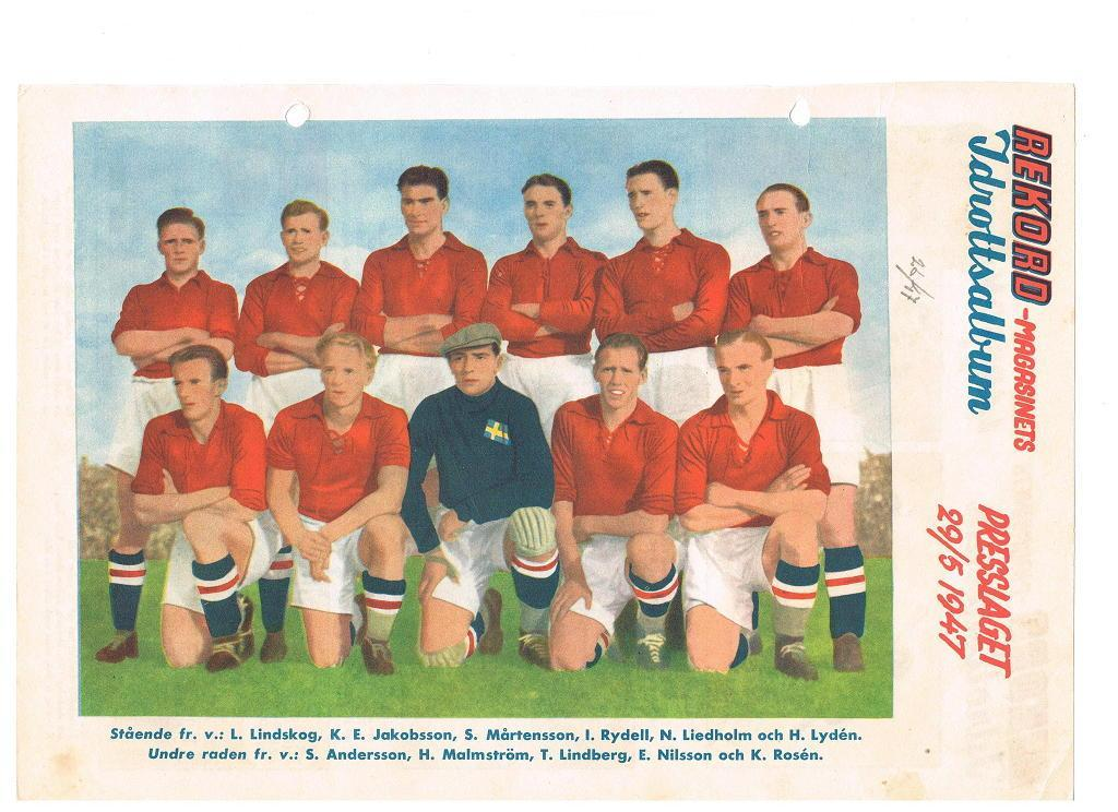 Presslaget, som den 29 maj 1947 slog Sverige med 1-0